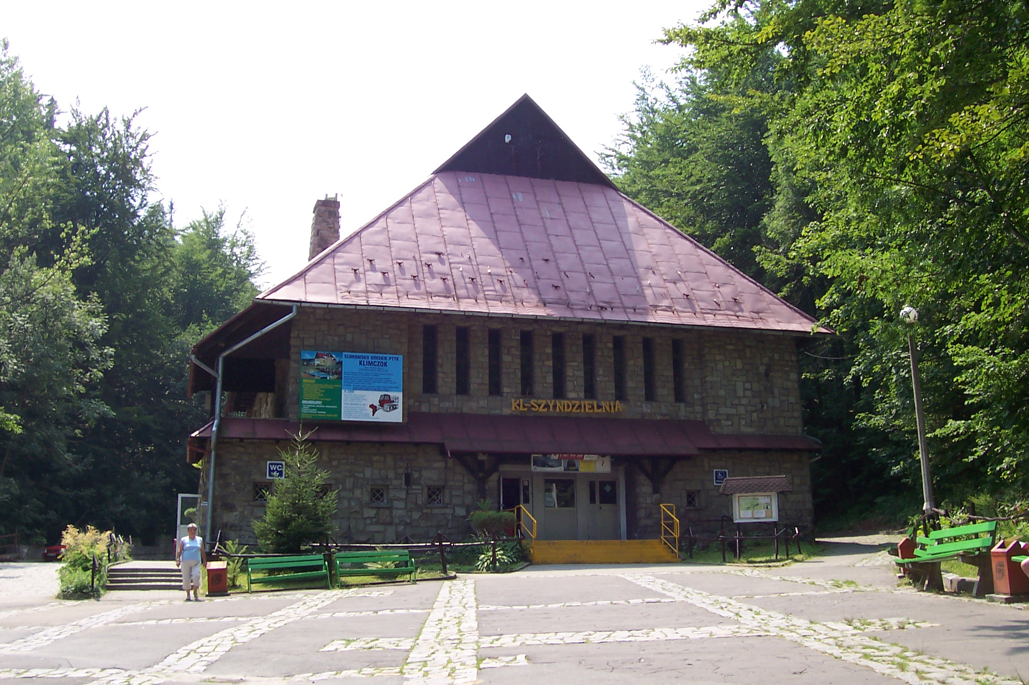 KL Szyndzielnia, stacja dolna